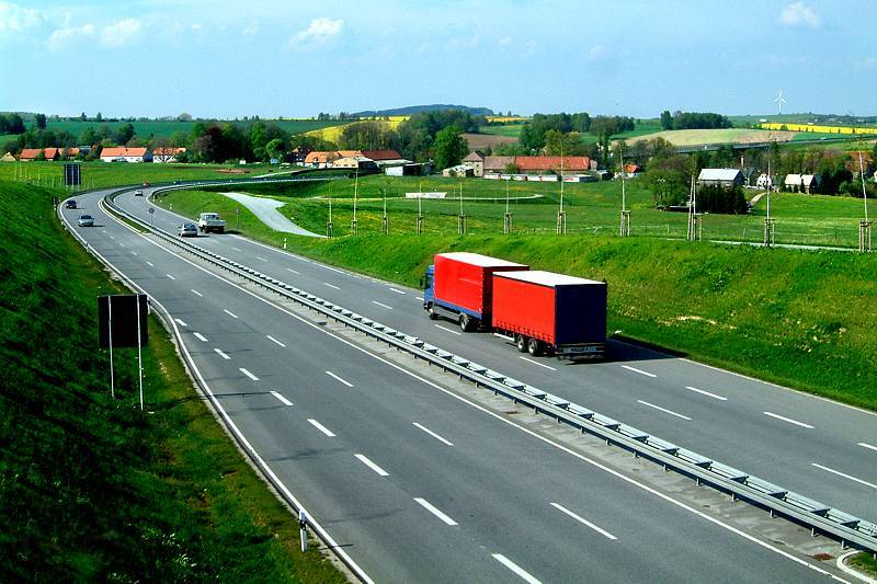 Löbau, Umgehungsstraße B 178 mit Blick auf Altlöbau und Oelsa